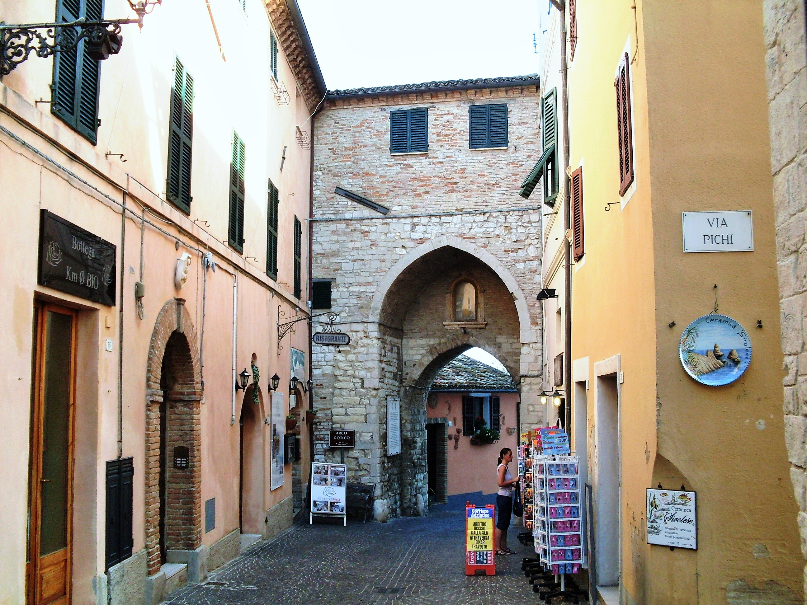 Sirolo arco interno